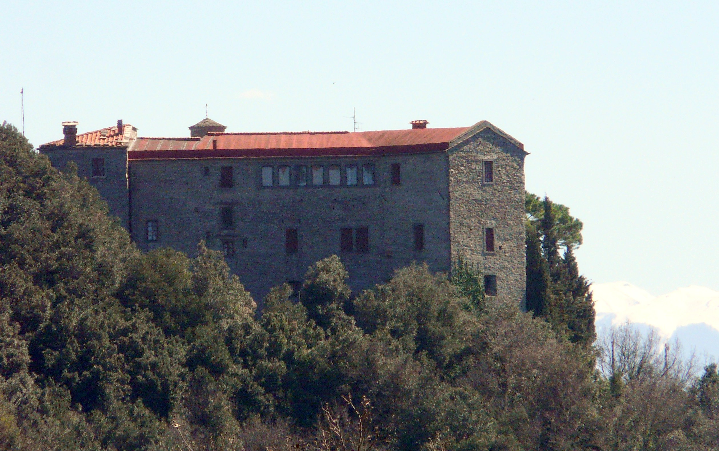 Castello di Podenzana, Toscana, Italia